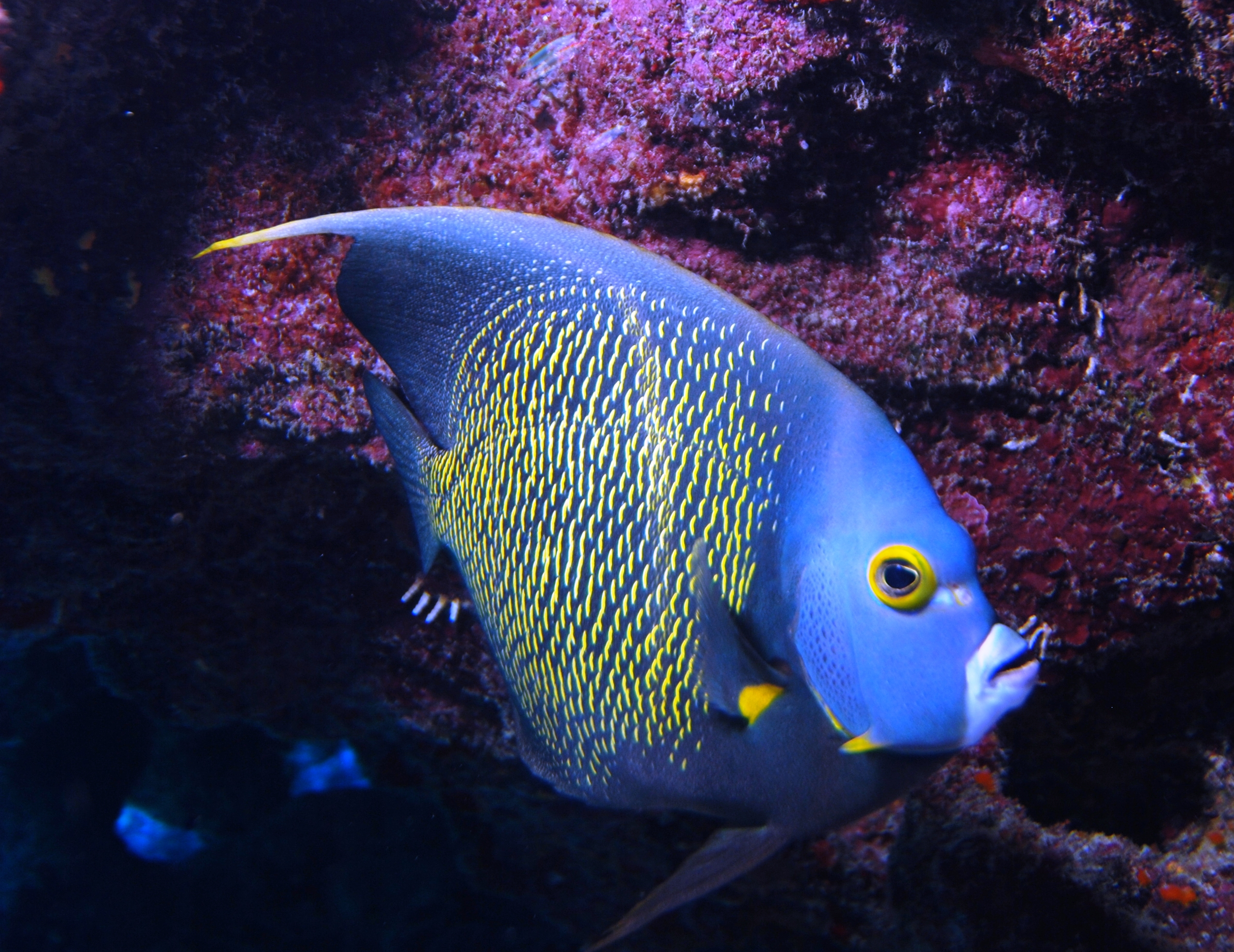 Pomacanthus paru (French angelfish)